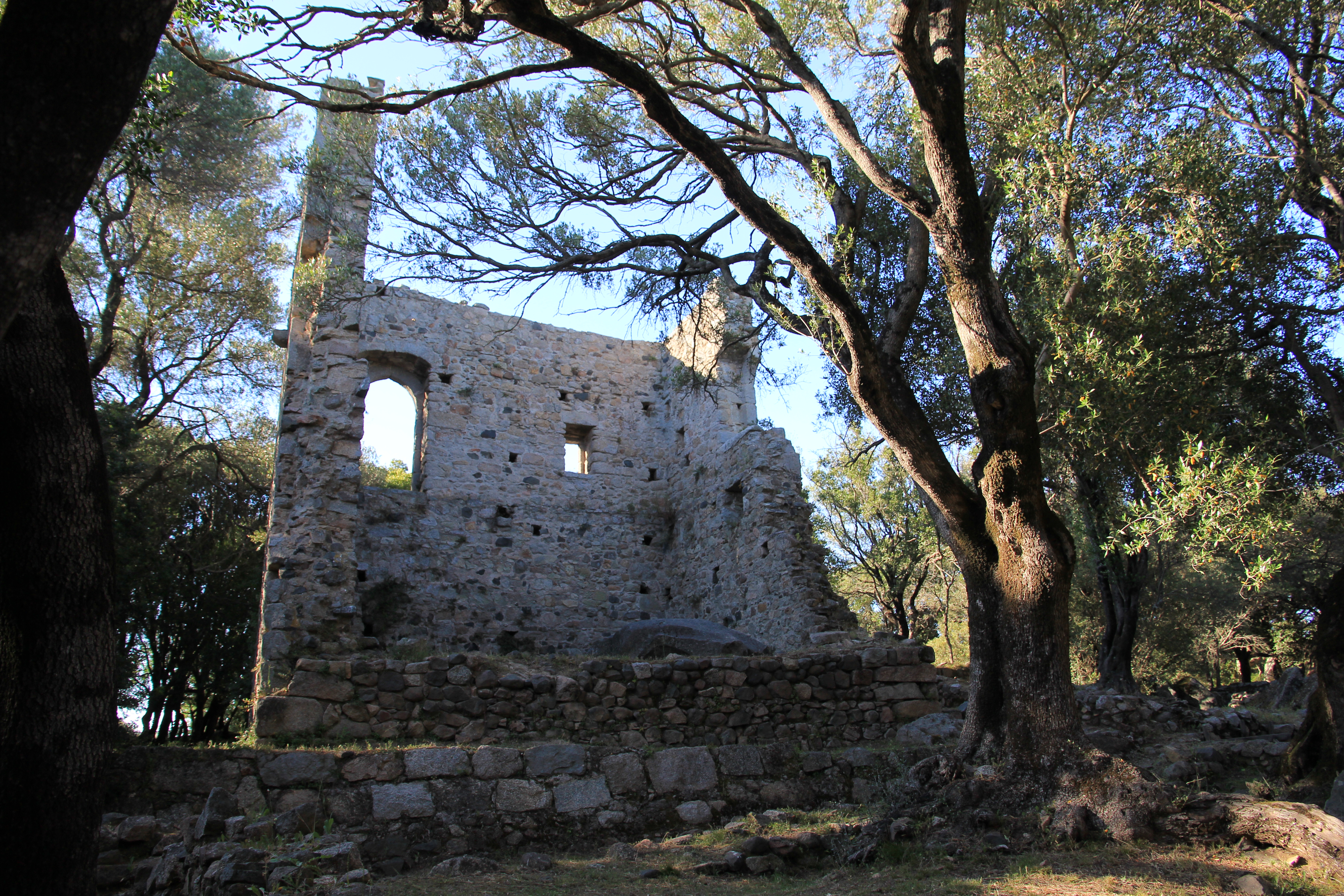 Luogosanto - Palazzo di Baldu